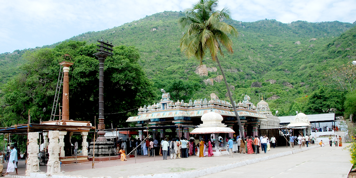 மேற்கு தொடர்ச்சி மலையின் மடியில் அமைந்து இருக்கும் மருதமலை பாலதண்டாயுதபாணி திருக்கோவில்